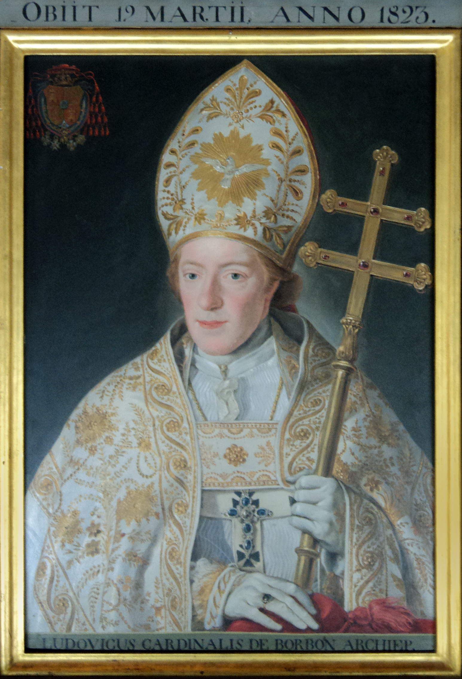 Cardenal Luis María de Borbón y Vallábriga en la sacristía de la Catedral de Toledo